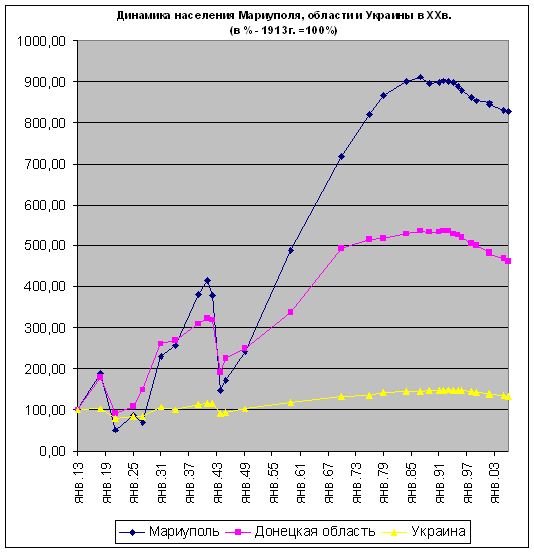 рост населения Мариуполя, Донецкой области и Украины в ХХ веке